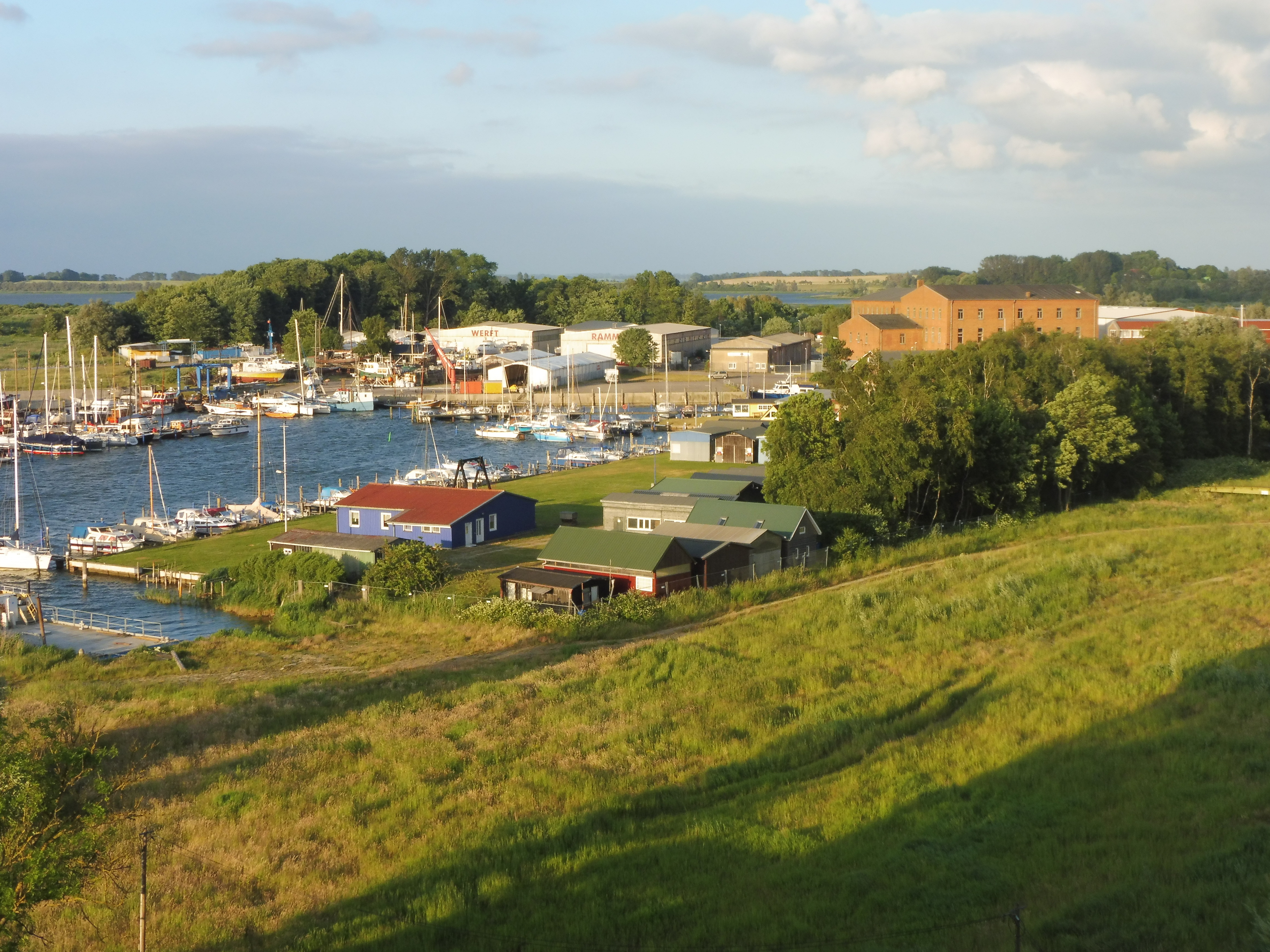 Östliches Hafenbecken mit Werft und ehemaliger Zuckerfabrik in Barth